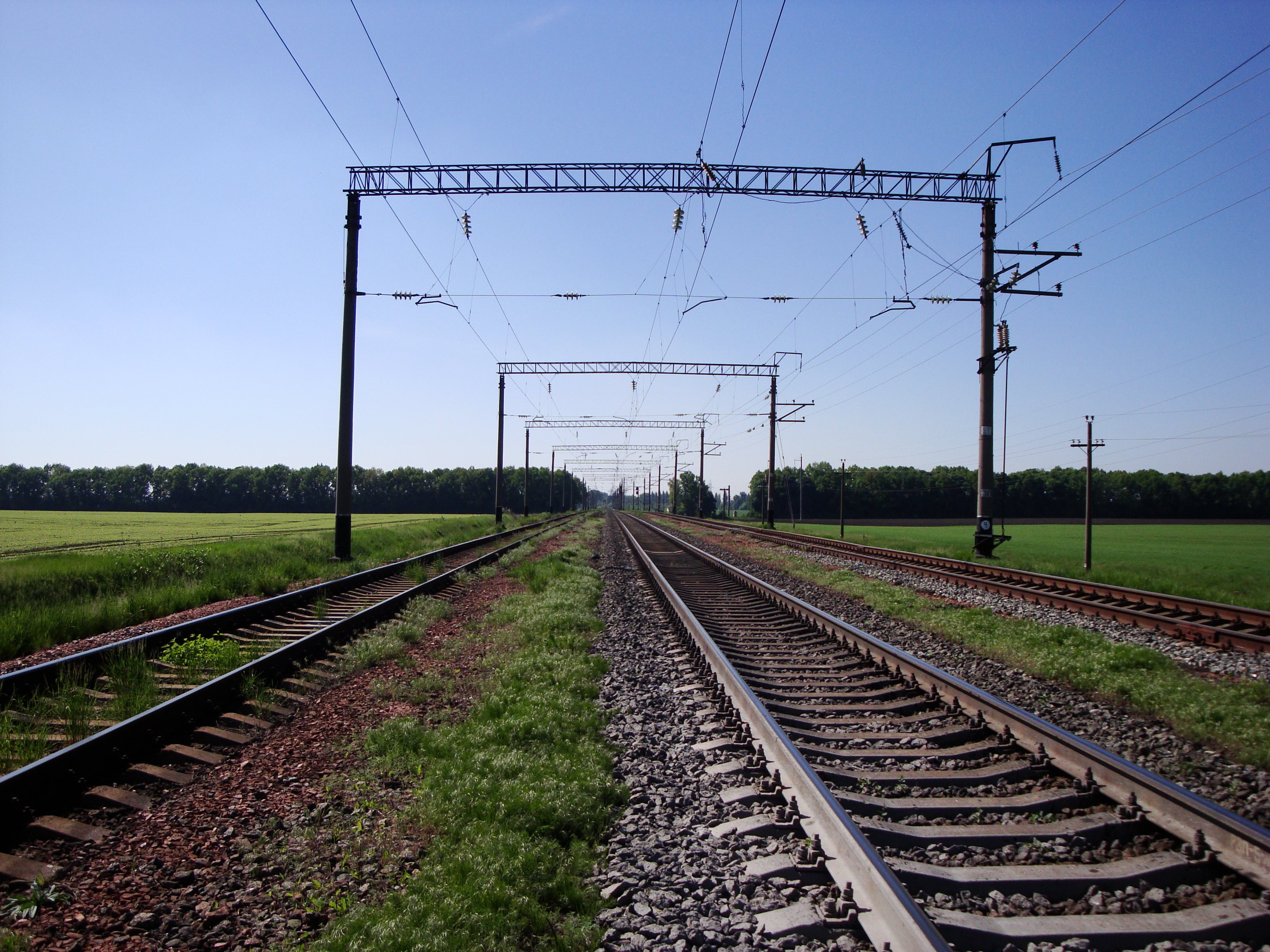 Станція Расава